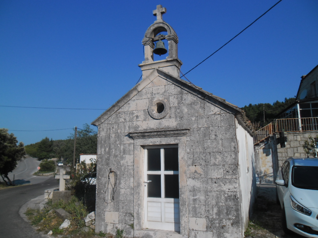 jedna od crkvica u Babinom Polju, otok Mljet